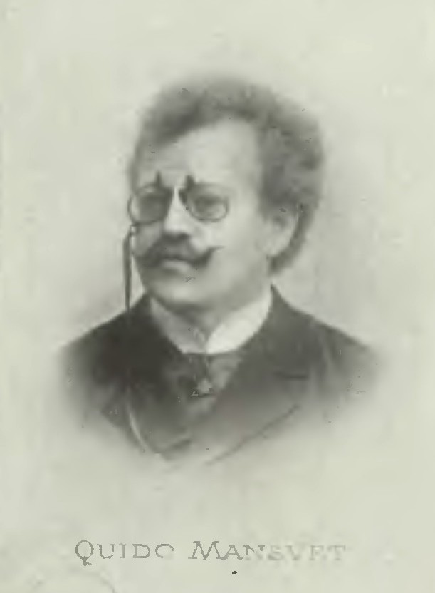 Portrét – František Klement (pseudonym Quido Mansvet) (1851-1933), Český spisovatel a cestovatel.